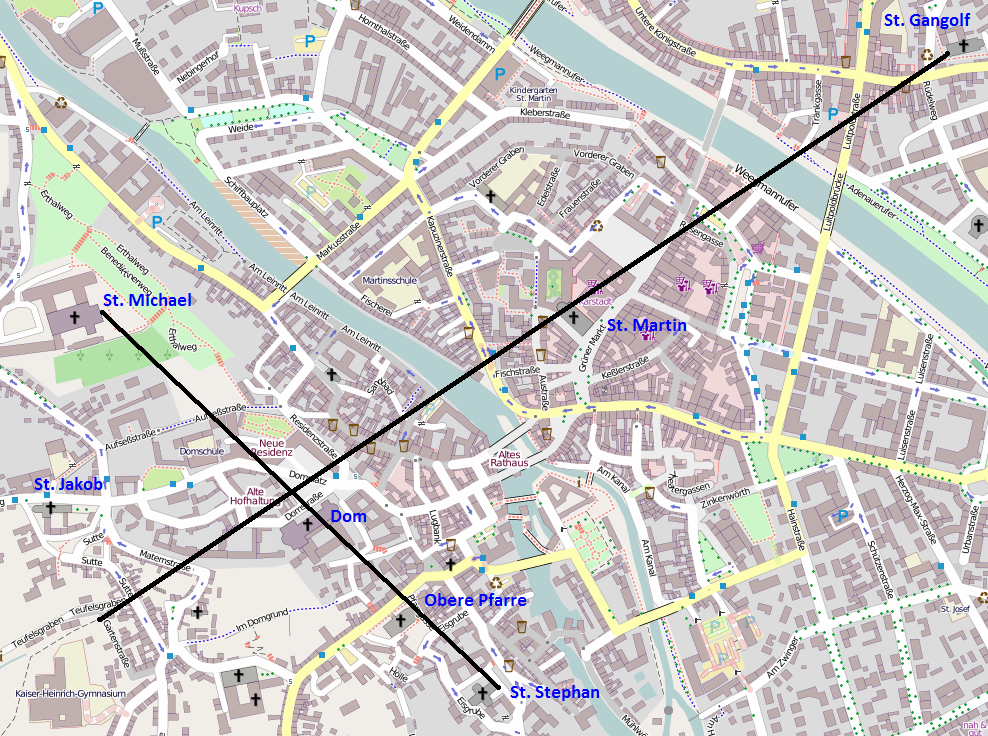 Das Kreuz über Bamberg basierend auf einer OSM-Karte und der Beschreibung auf Wikipedia